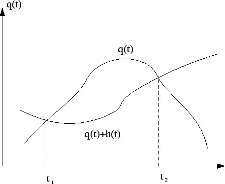 Równania Eulera-Lagrange'a